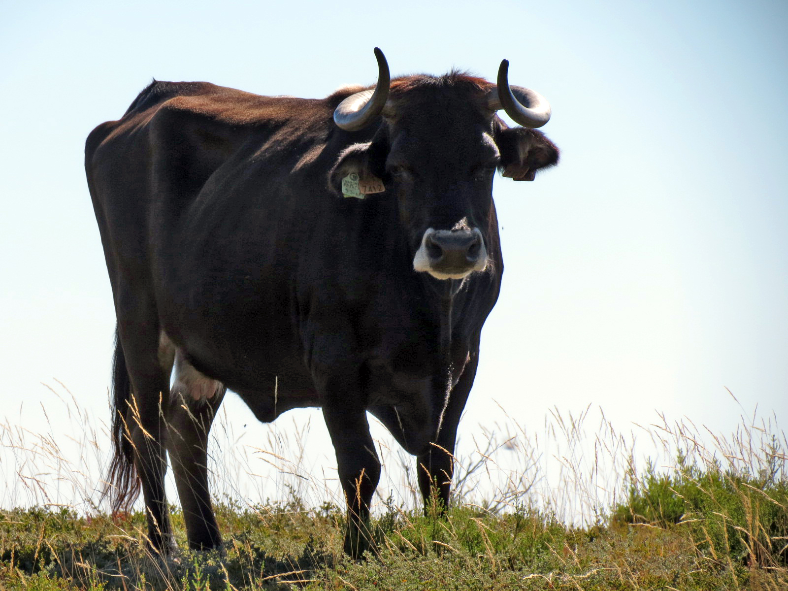 A Vaca maronesa é típica desta região. This is a photography of a Site of Community Importance in Portugal with the ID: PTCON0003. Natura2000 entry, EEA entry